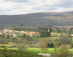 paysage du village d'Evette-Salbert avec les Vosges en toile de fond. Photo prise au printemps, le 18 avril 2004 par LP90 Licence GFDL LP90